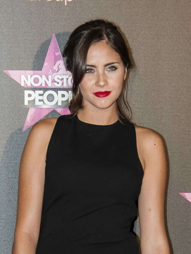 Fotos del photocall y fiesta de lanzamiento de un nuevo canal de televisión en España.